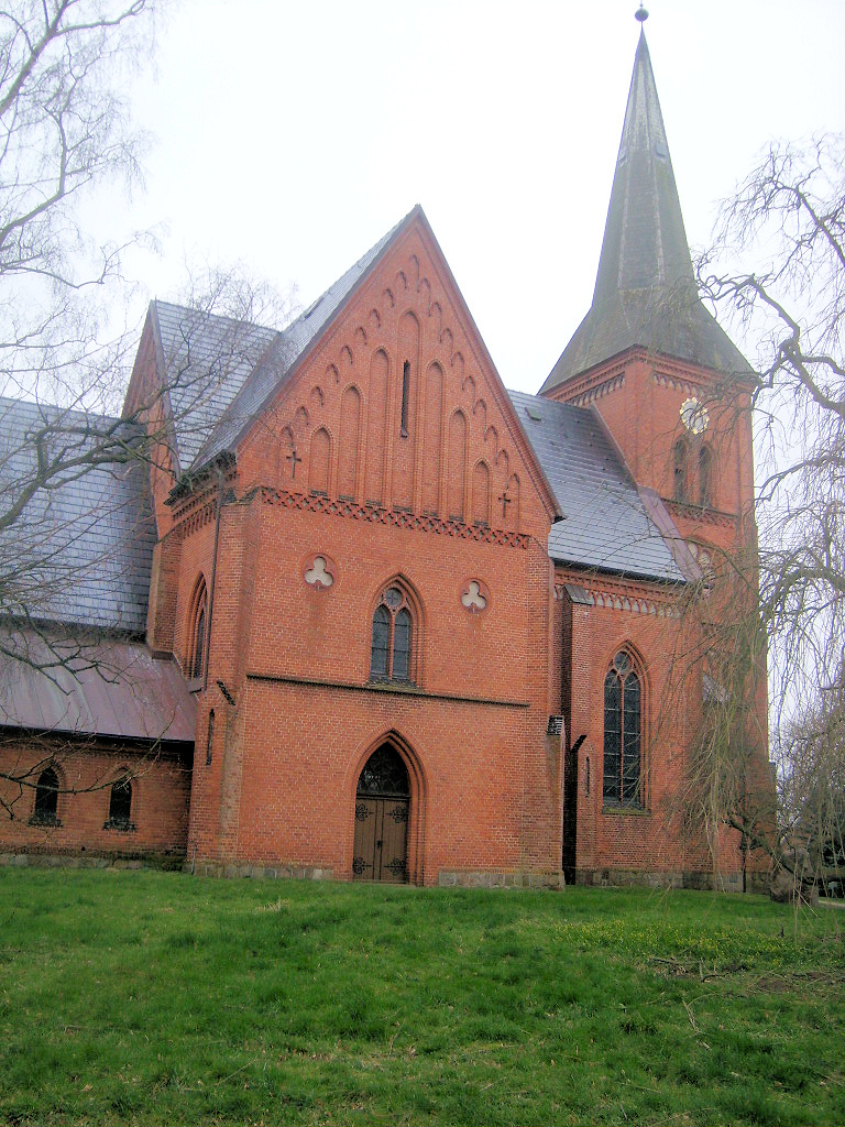 Neugotische Dorfkirche in Carlow im Landkreis Nordwestmecklenburg